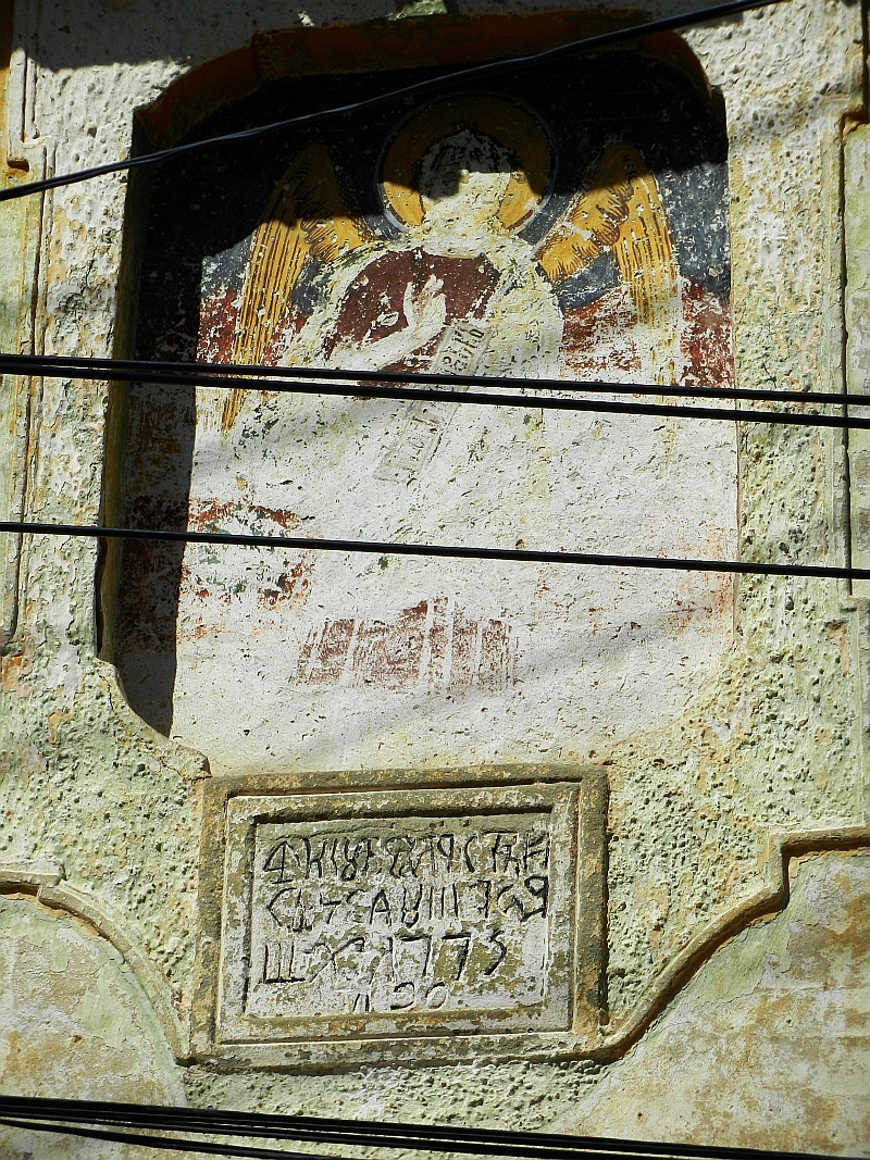 Casa cu icoană